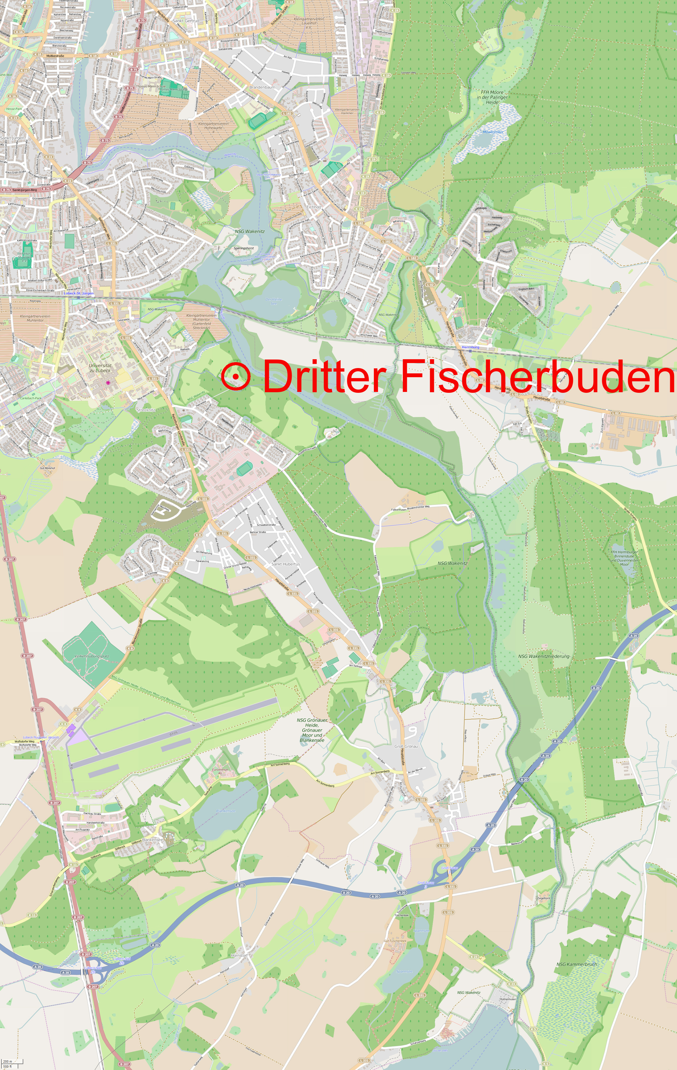 Die Lage des Wakenitzhorsts Dritter Fischerbuden